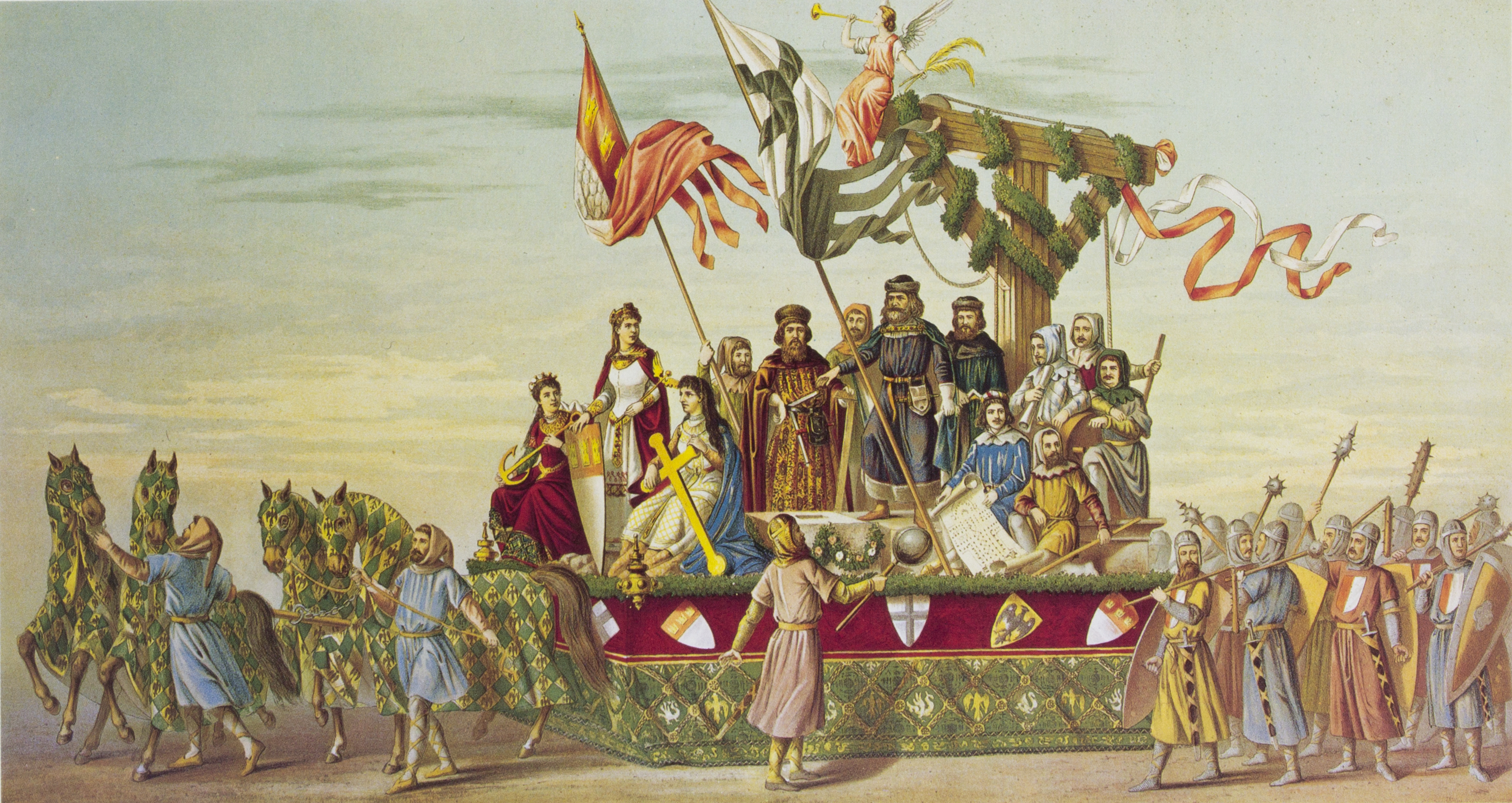 Tony Avenarius: Historischer Festzug veranstaltet bei der Feier der Vollendung des Kölner Doms am 18. October 1880. Tafel VI